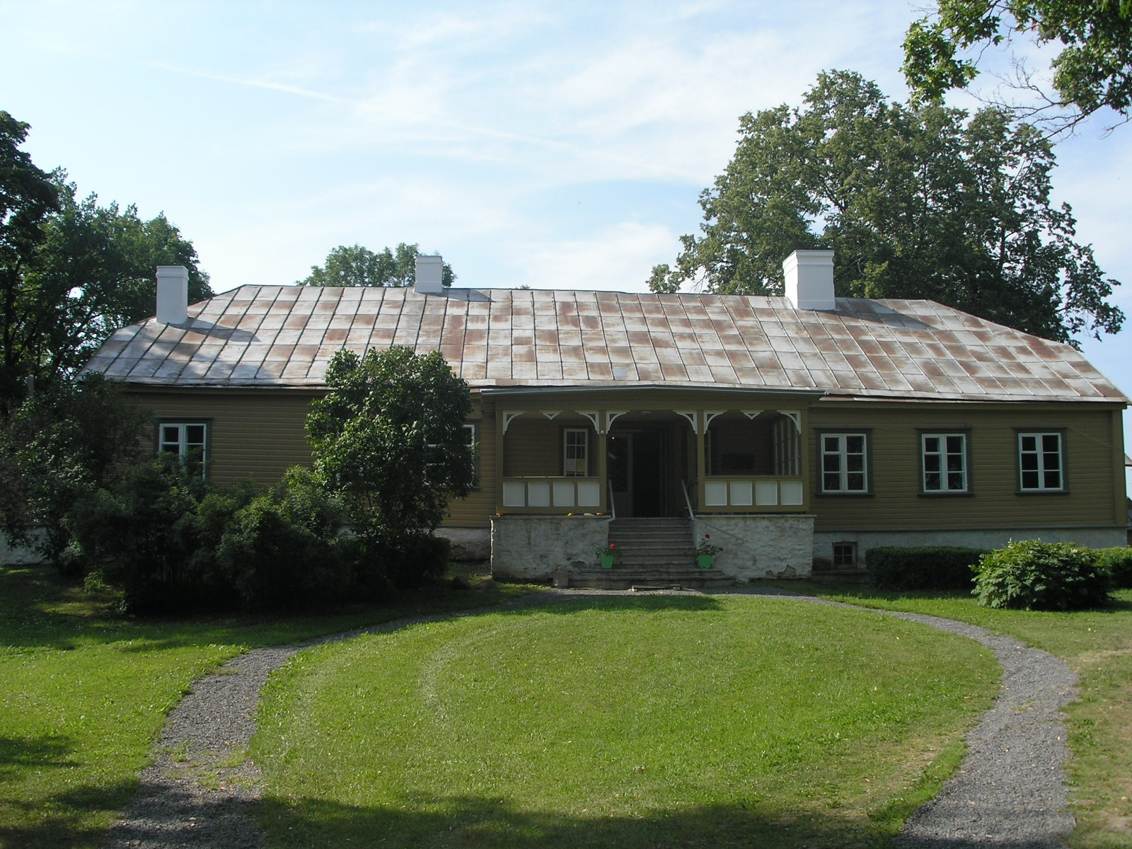 Viru-Nigula muuseum, endine Otto Wilhelm Masingu pastoraat.